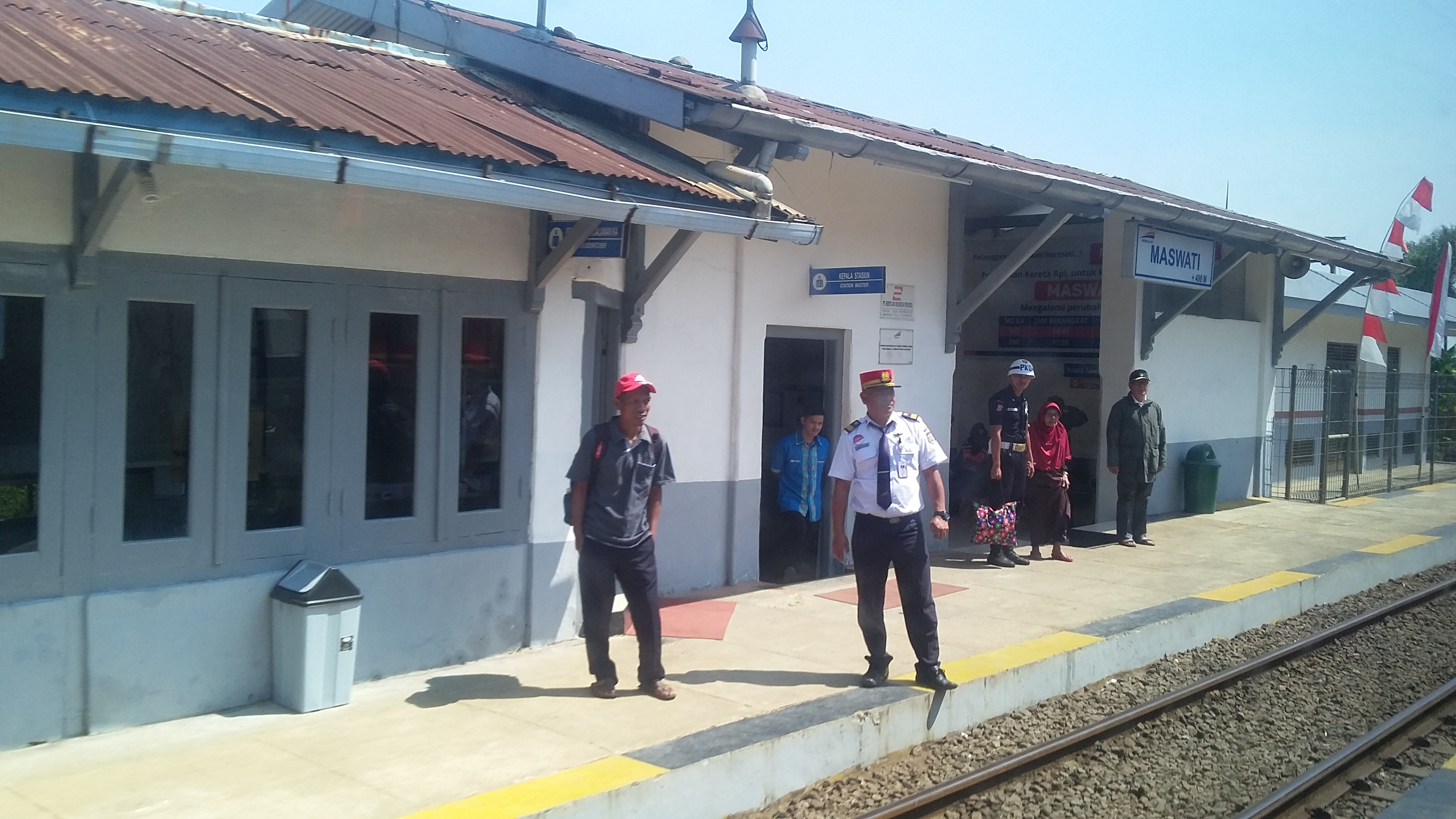 Stasiun Maswati